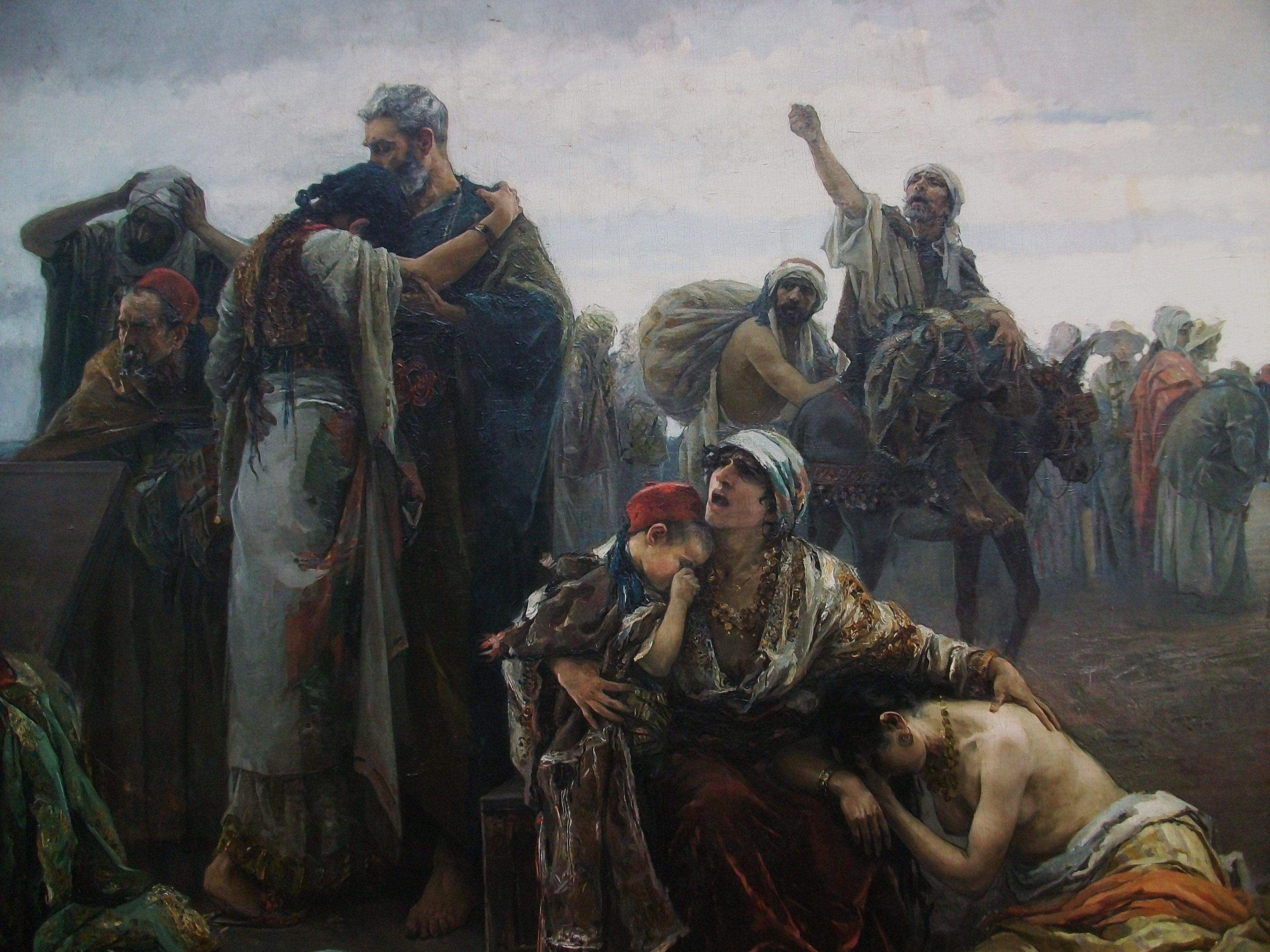 Detall del quadre L'expulsió dels moriscos (1894), Gabriel Puig Roda (Tírig 1865-Vinaròs 1919), Museu de Belles Arts de Castelló. Oli sobre llenç, 355 x 556 cm.